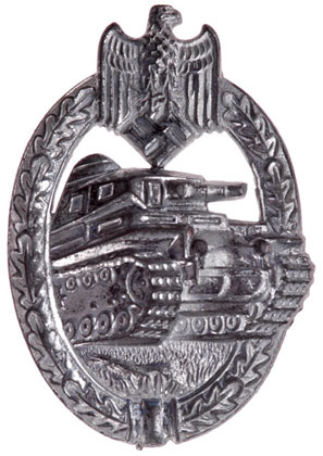 Зображення Срібного нагрудного знаку "За танкову атаку"